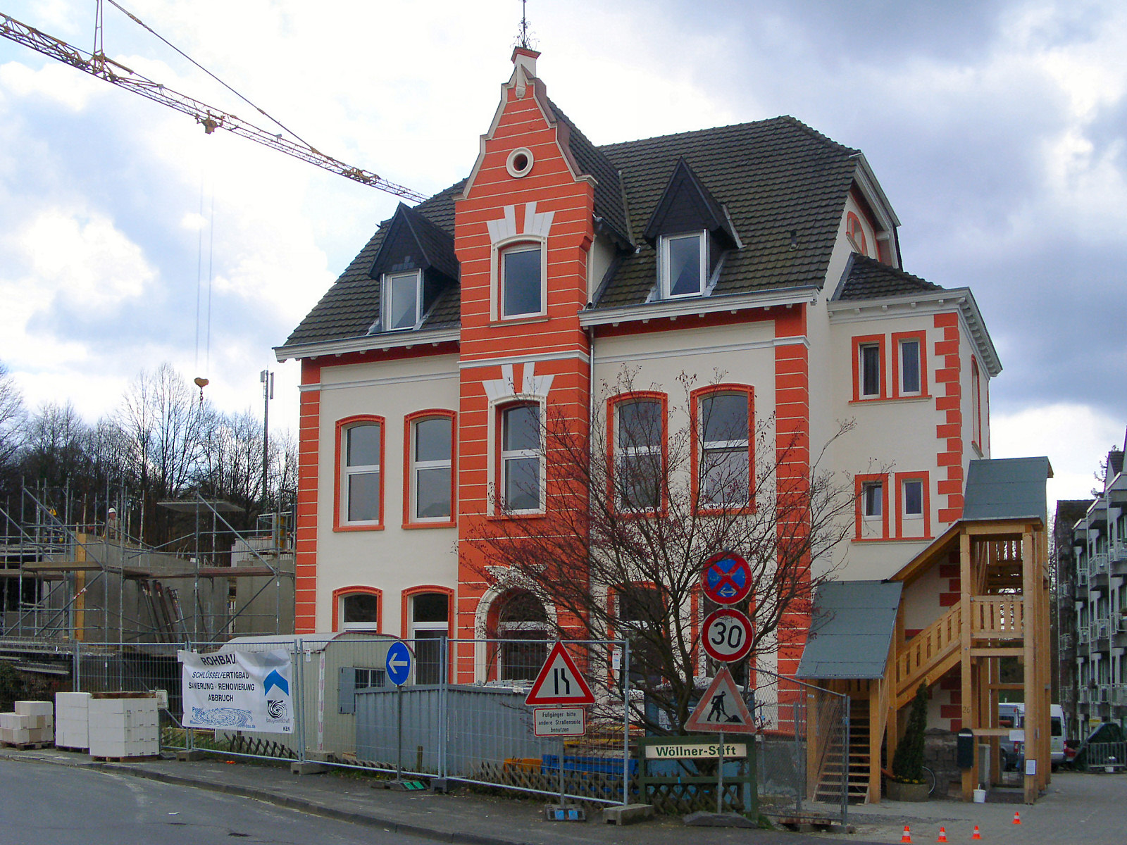 Wöllnerstift in Rösrath-Hoffnungsthal